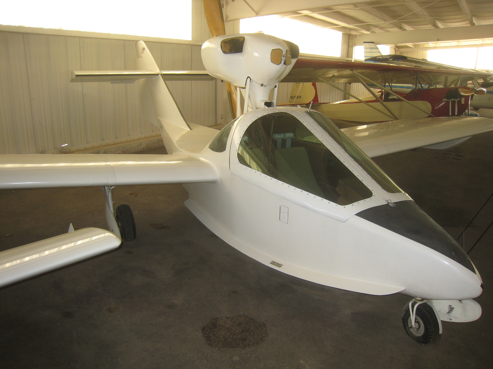 Pereira GP.3 Osprey II